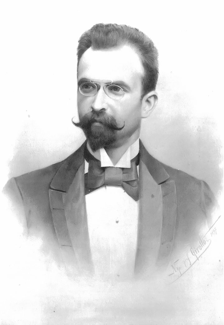 Gabor Steiner (1897) retouschierte Fotografie von Girotto aus dem Jahr 1897